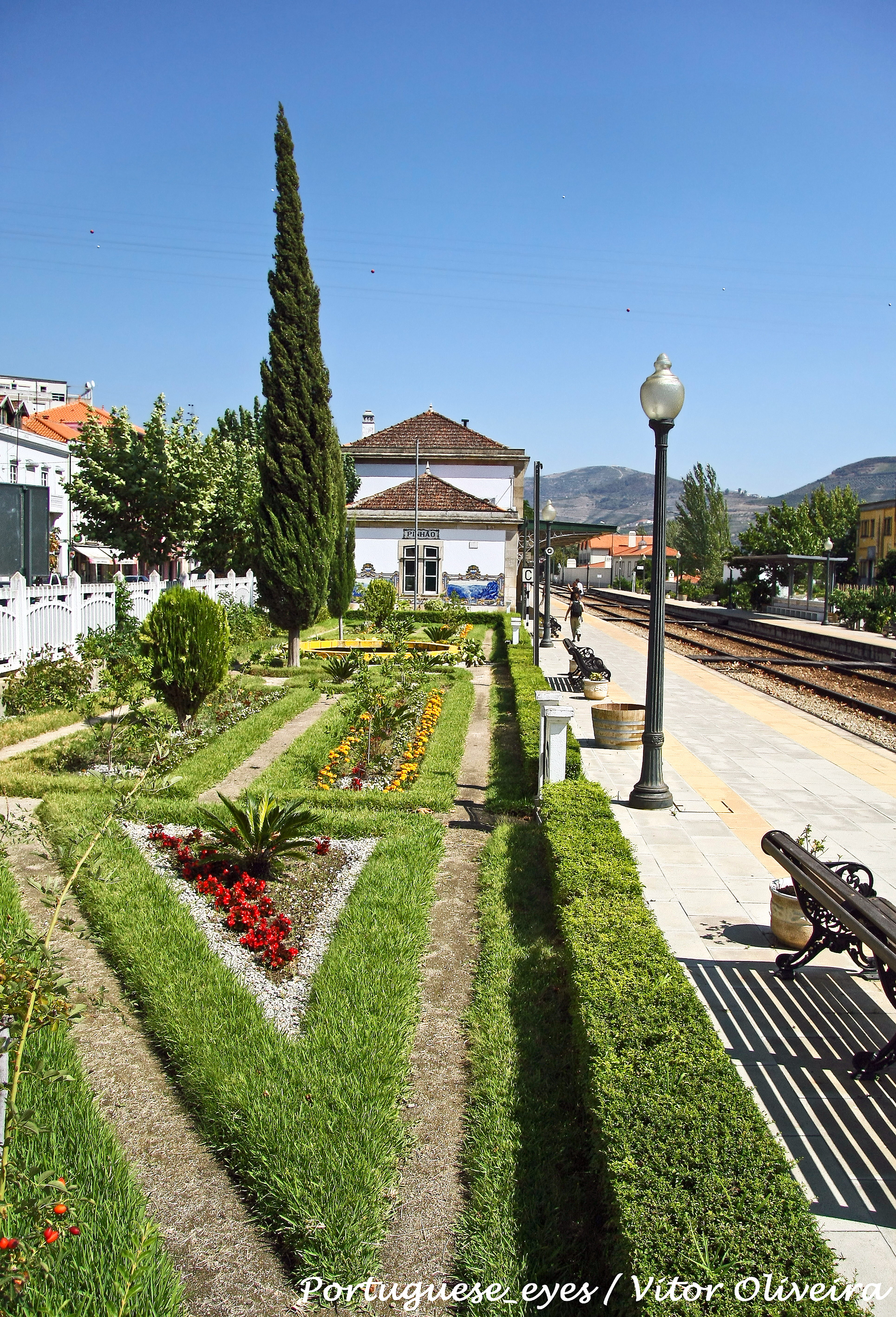 A estação de caminhos-de-ferro do Pinhão, assentada no quilómetro 118 da Linha do Douro, é uma das mais famosas estações deste trajecto ferroviário. É famosa pelos seus 24 painéis cujos mosaicos reflectem paisagens do Douro representativas do serviço vinhateiro da região. Em tons de azul, os azulejos são da autoria de J. Oliveira e foram encomendados à fábrica Aleluia, de Aveiro, em 1937. See where this picture was taken. [?]